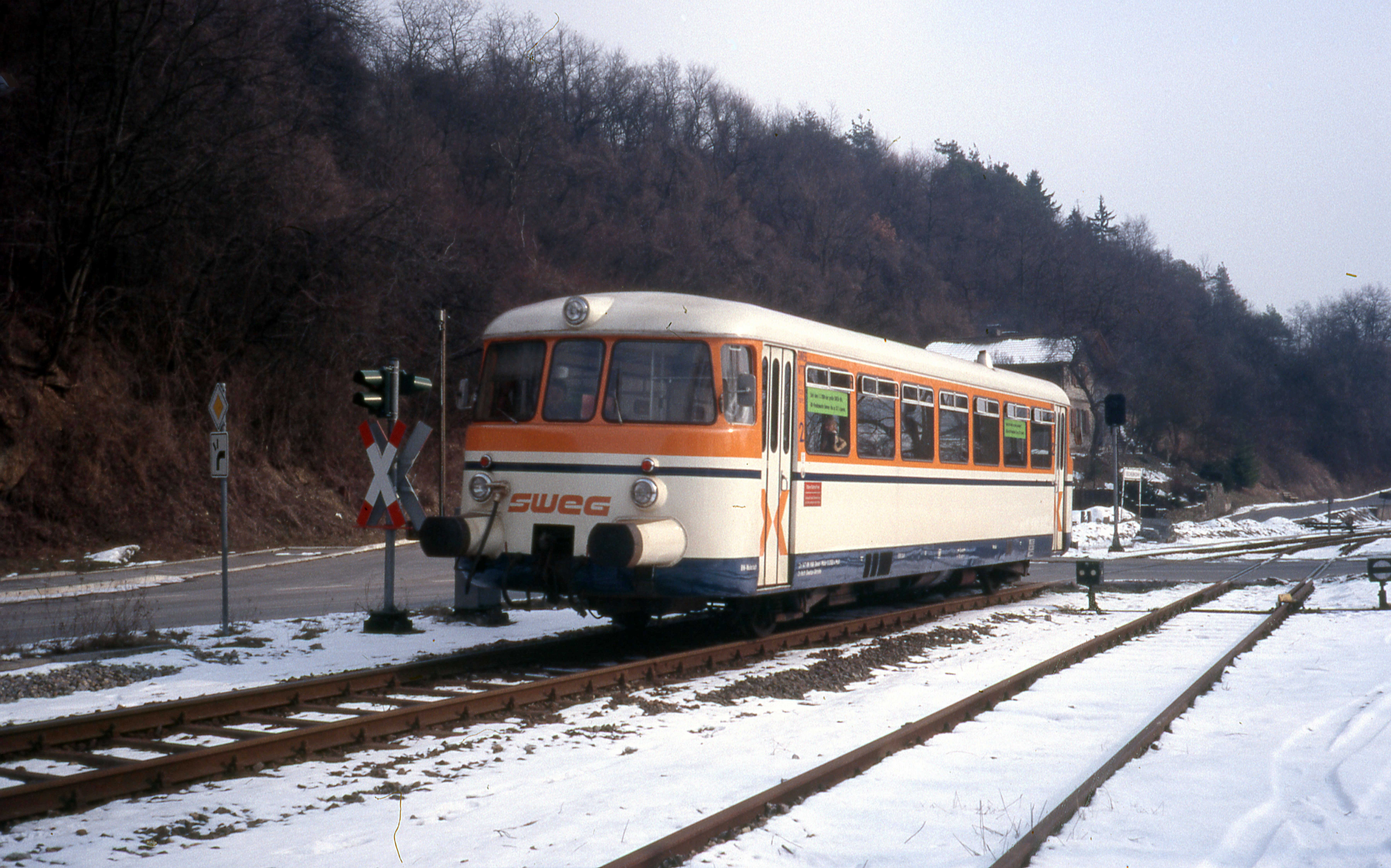 Eschelbronn, 20.2.1986